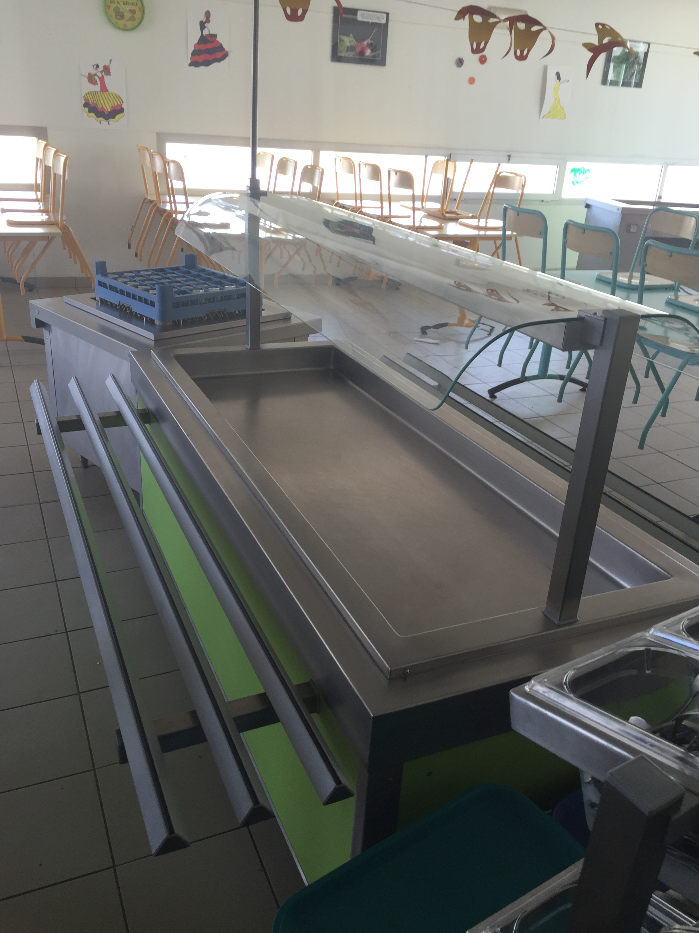 2 bacs repose plats: - un pour l'entrée - un pour les plats chauds Les bacs sont séparés, les élèves se servent d'abord en entrée puis en plat chaud. Ils sont accompagnés par des animateurs.